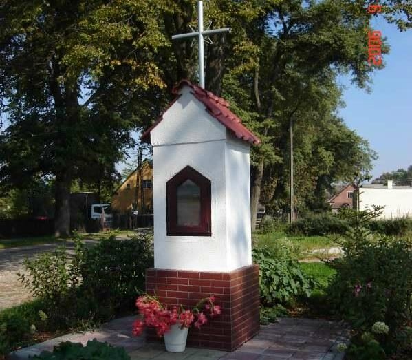 Redło - kapliczka